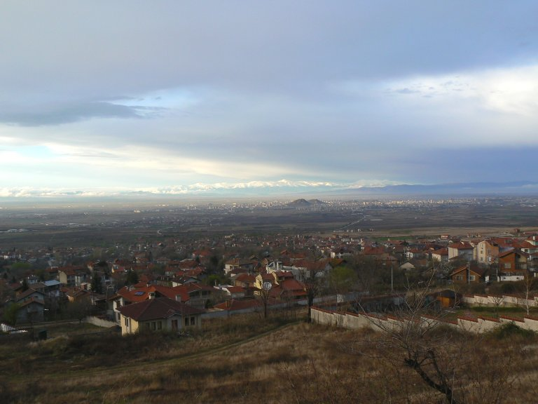 Село Марково, област Пловдив, България.